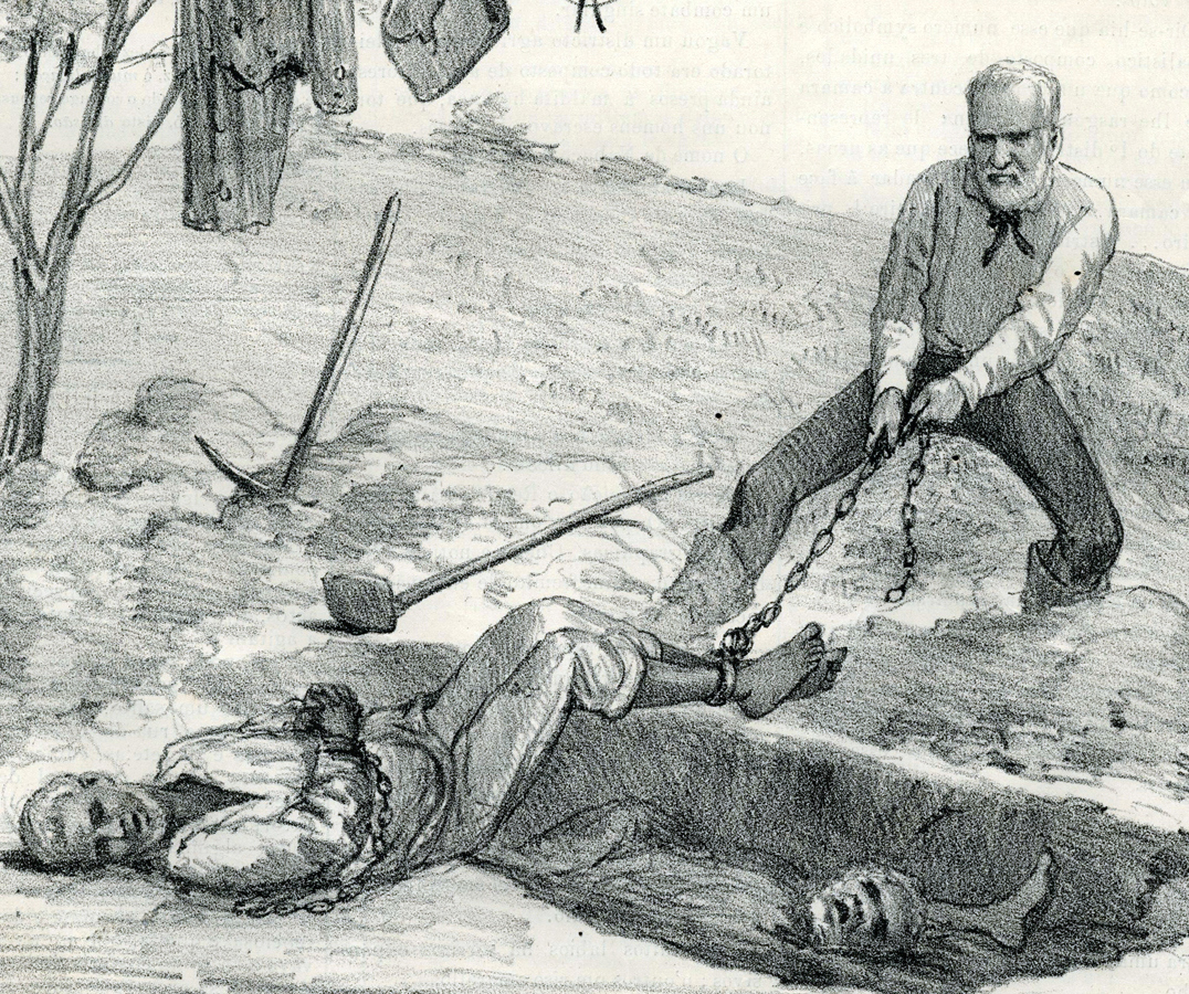 A edição 413 da Revista Ilustrada, em 1885, critica a Lei dos Sexagenários e um de seus redatores posteriores, o Conselheiro Saraiva.